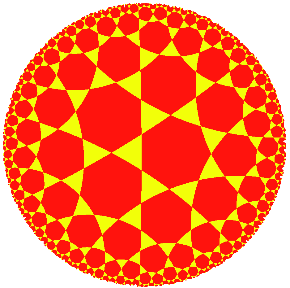 Image d'un pavage triheptagonal